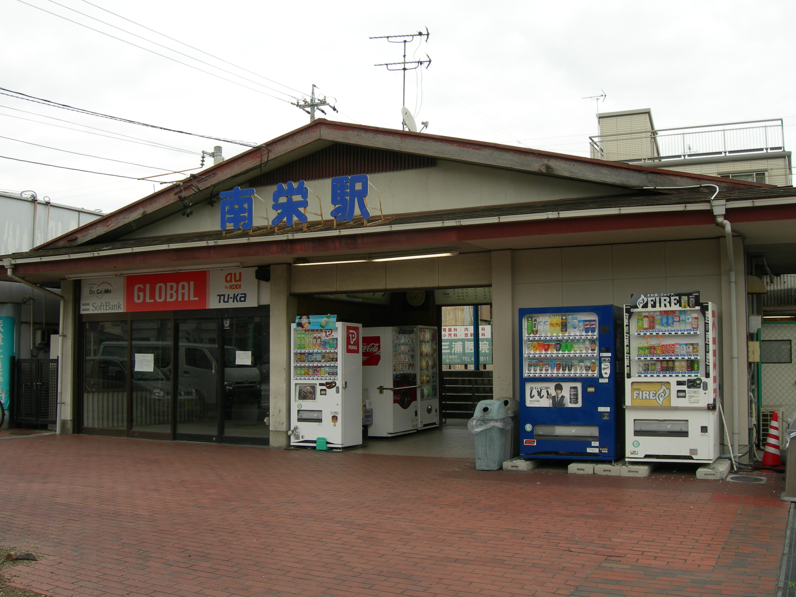 南栄駅